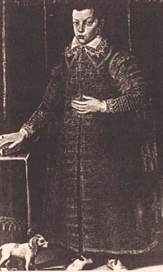 Portrait of Carlo di Ferdinando de' Medici (1595-1666)